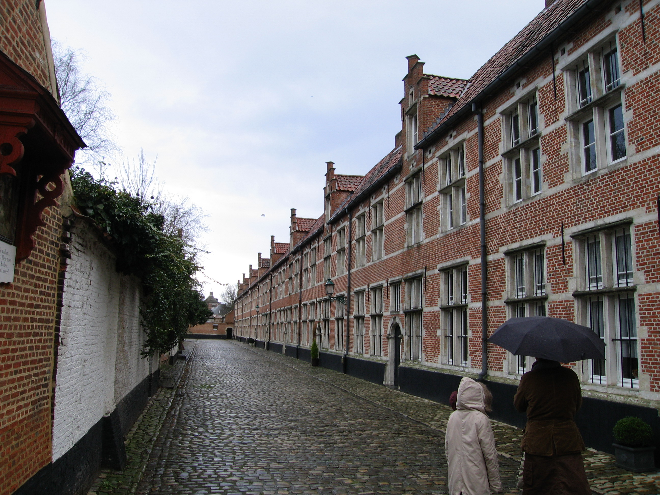 Begijnhof in Lier: straatje genaamd Grachtkant (Eigen foto).